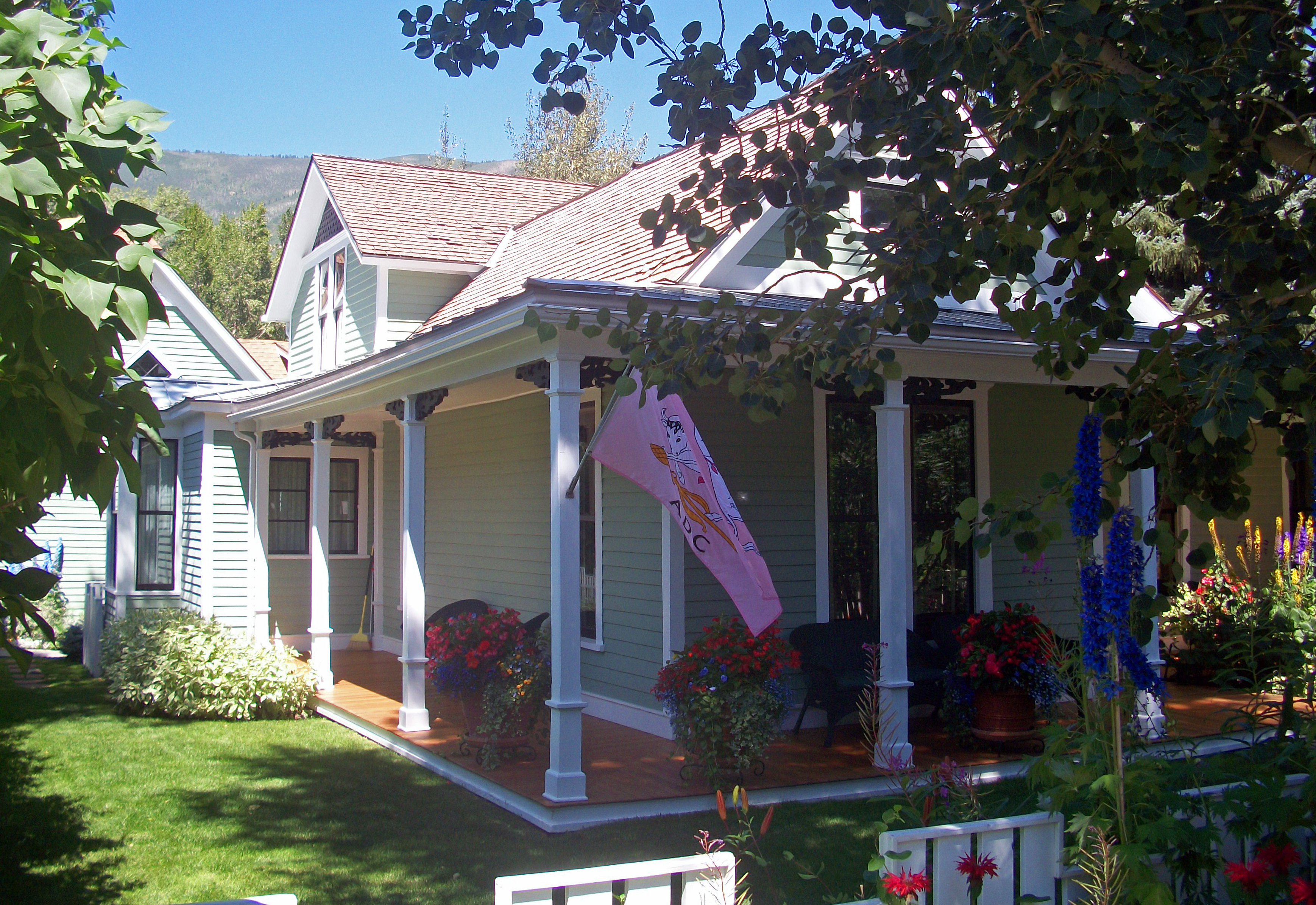 Samuel I. Hallett House, Aspen, CO, USA